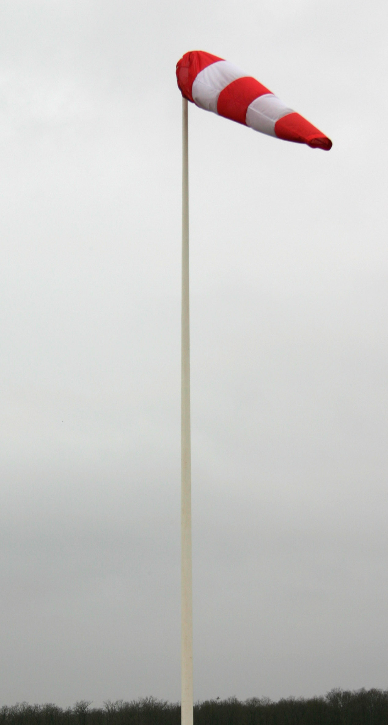 ©éréales Kille®